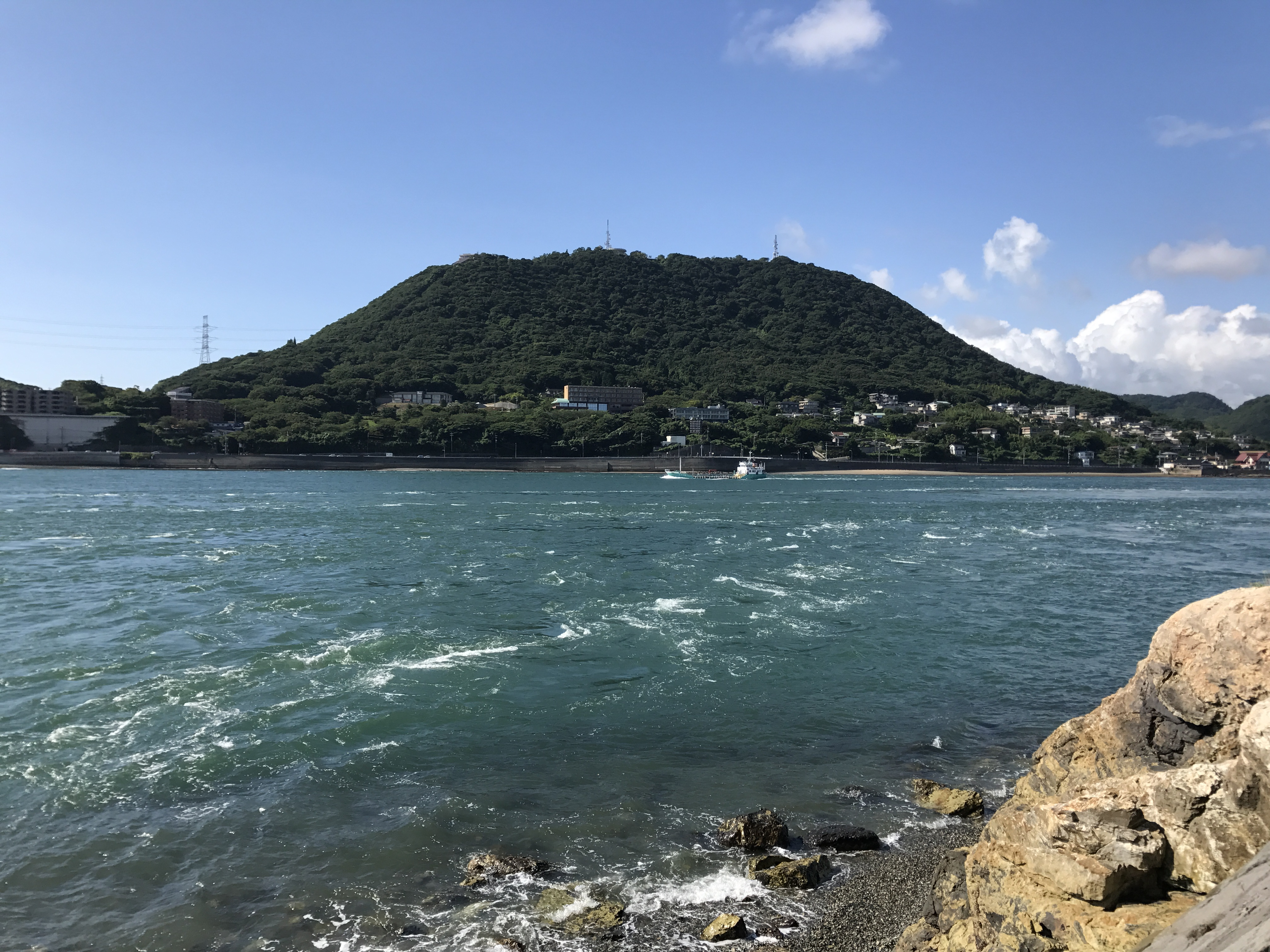 門司埼灯台付近より望む関門海峡と火の山